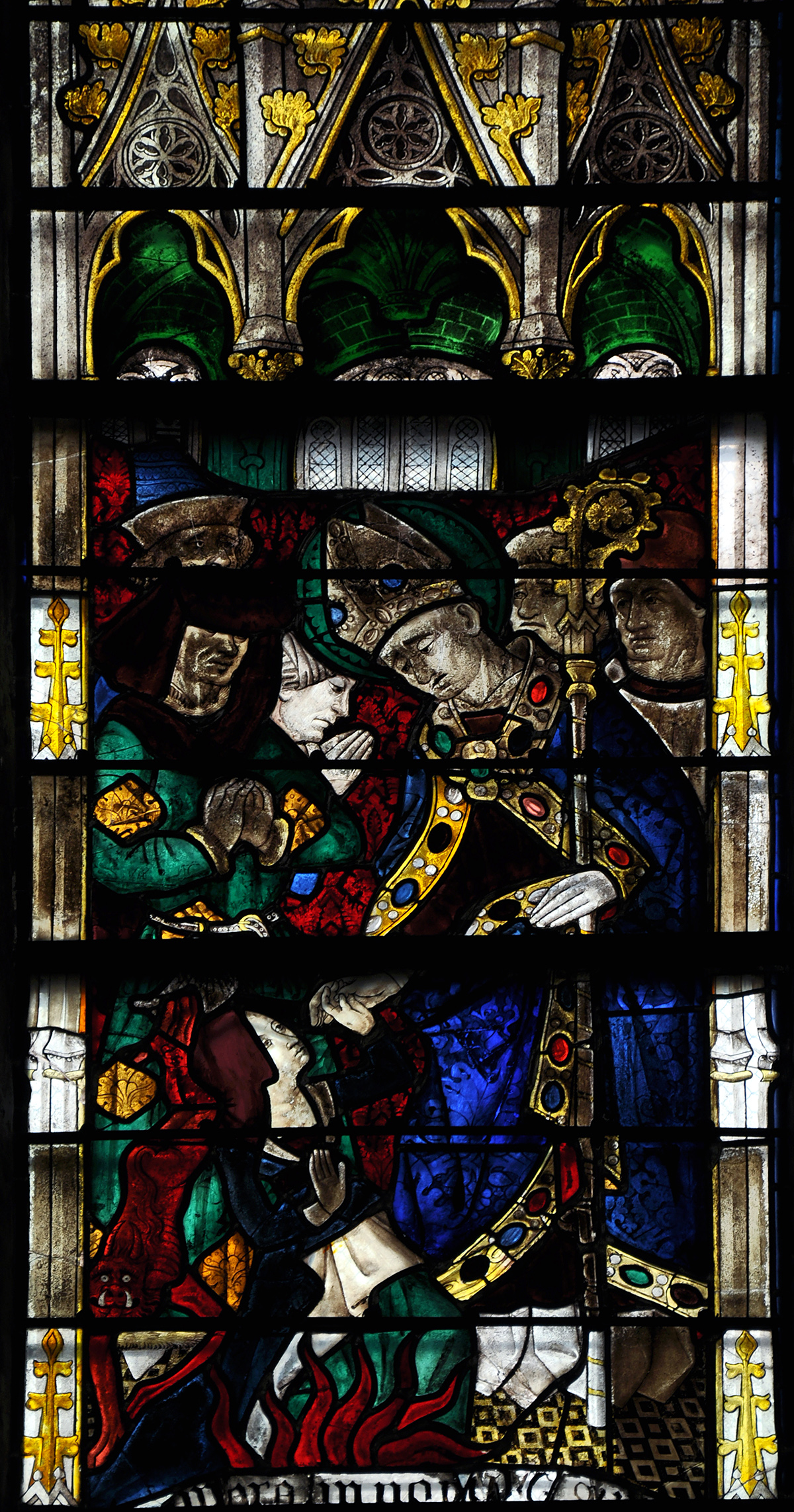 Détail d'un vitrail (baie 1) de l'église Saint-Taurin à Evreux (vers 1450). Scène de la vie de Saint Taurin; Saint Taurin sauve Euphrasie, fille de Lucius, précipitée dans le feu par le Diable. (Les vitraux de Haute-Normandie, Éditions du CNRS, Paris 2001, p. 161, ISBN 2-271-05548-2)